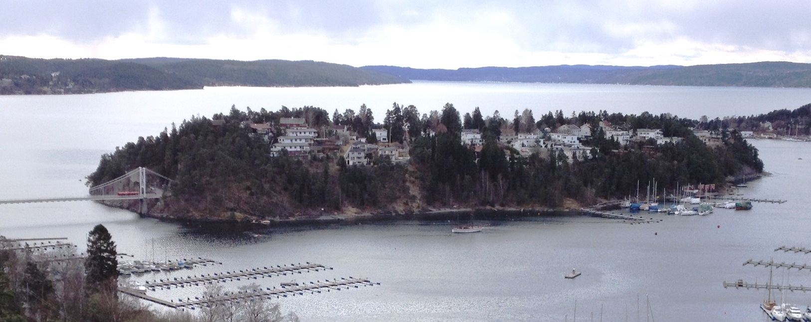 The island Ulvøya in The Oslo Fjord